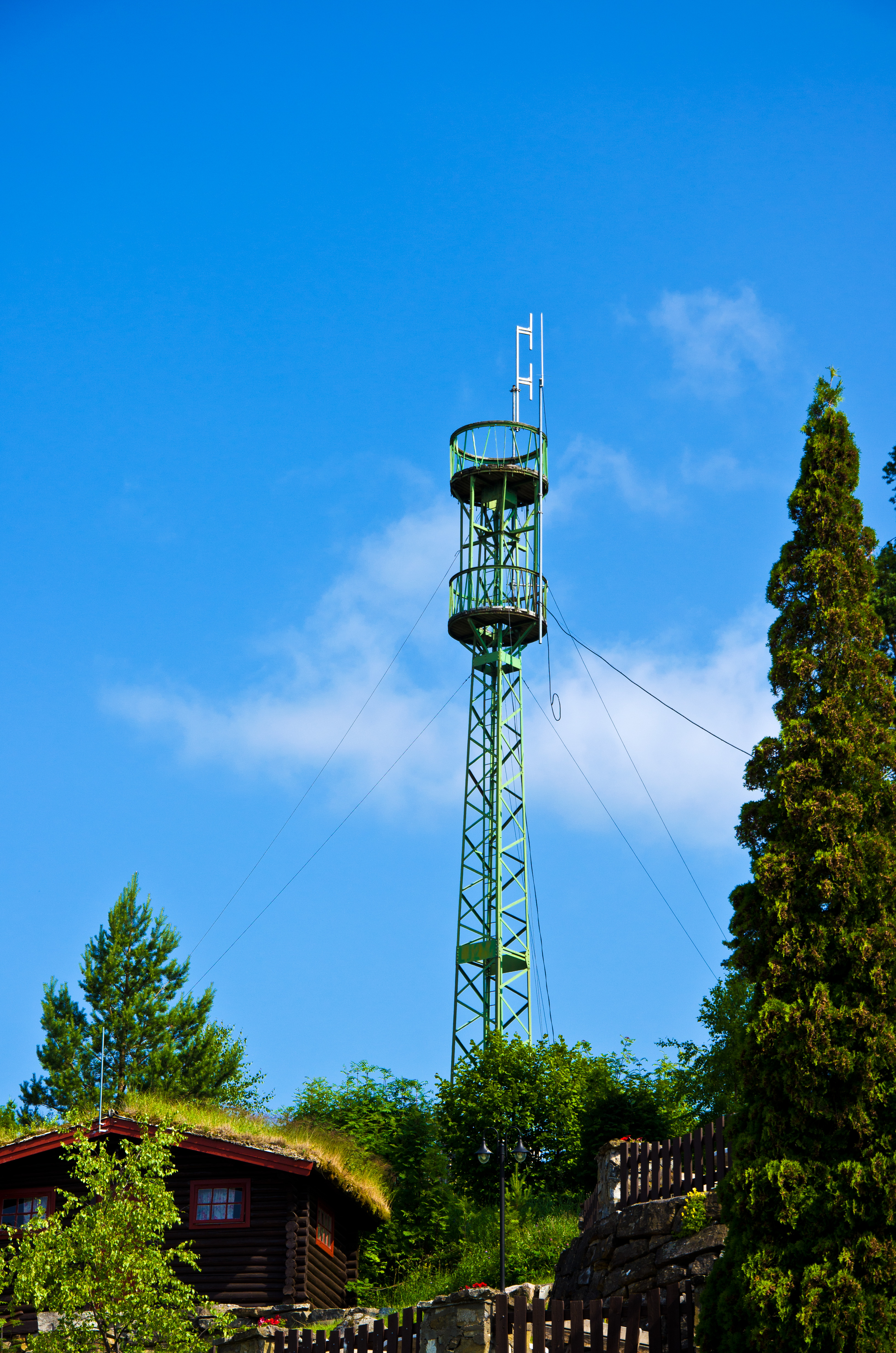 Radiomasten på Hedmarktoppen, Hamar.